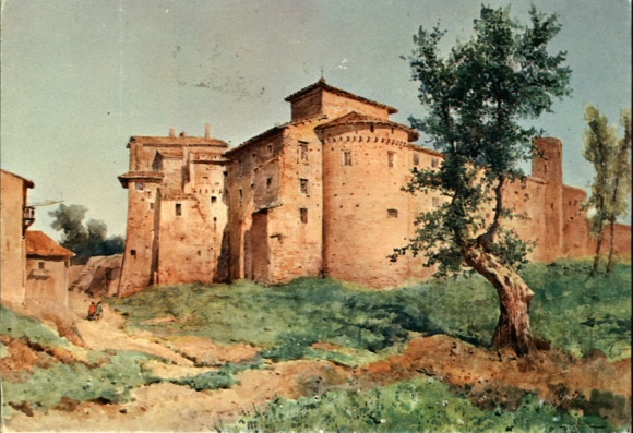 Chiesa dei SS. Quattro Coronati in Rome (rione Celio)